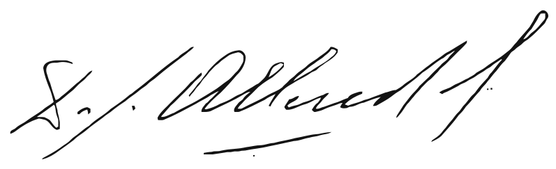 Salvador Allende Signature